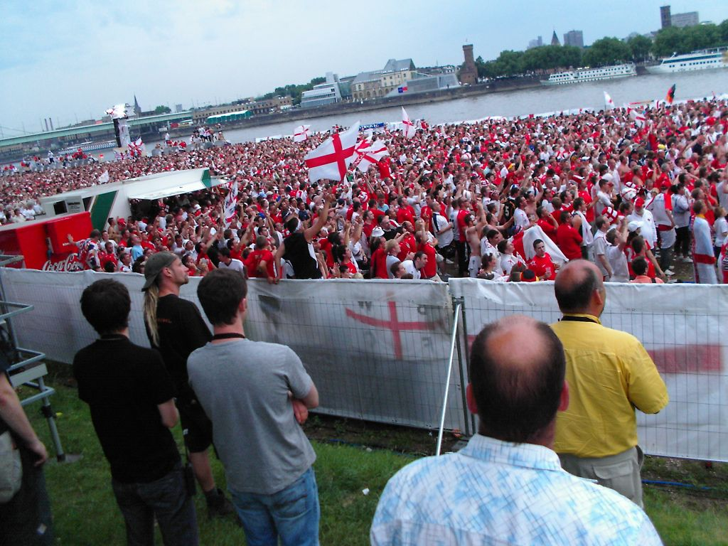 Englische Fans am Rheinufer in Köln-Deutz vor Beginn des Länderspiels England - Schweden am 20.06.2006.